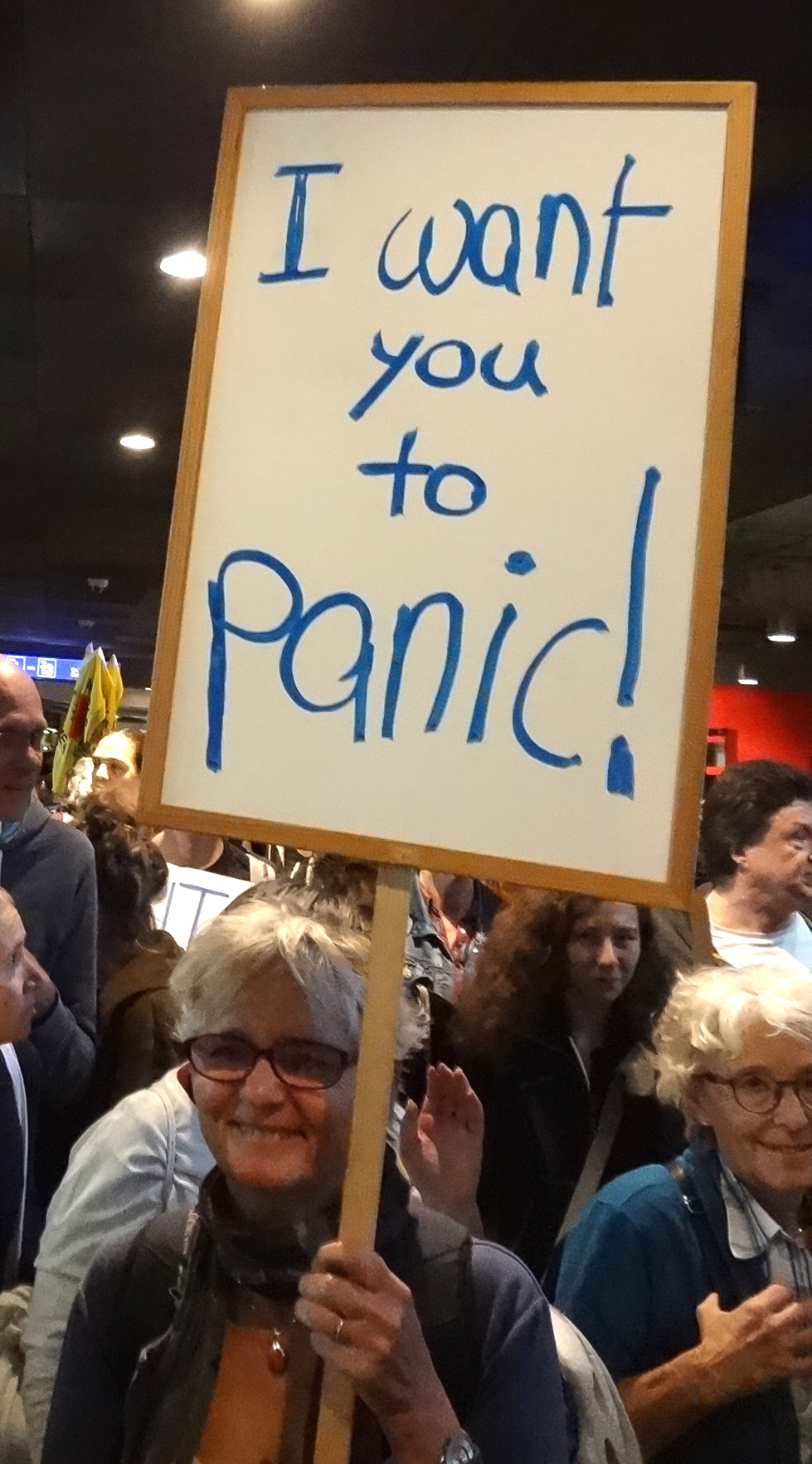 Manif climat à Berne 28 septembre 2019. Banderoles et slogans. Hall principal de la gare de Berne, autour du point de rencontre. « I want you to panic ! ».